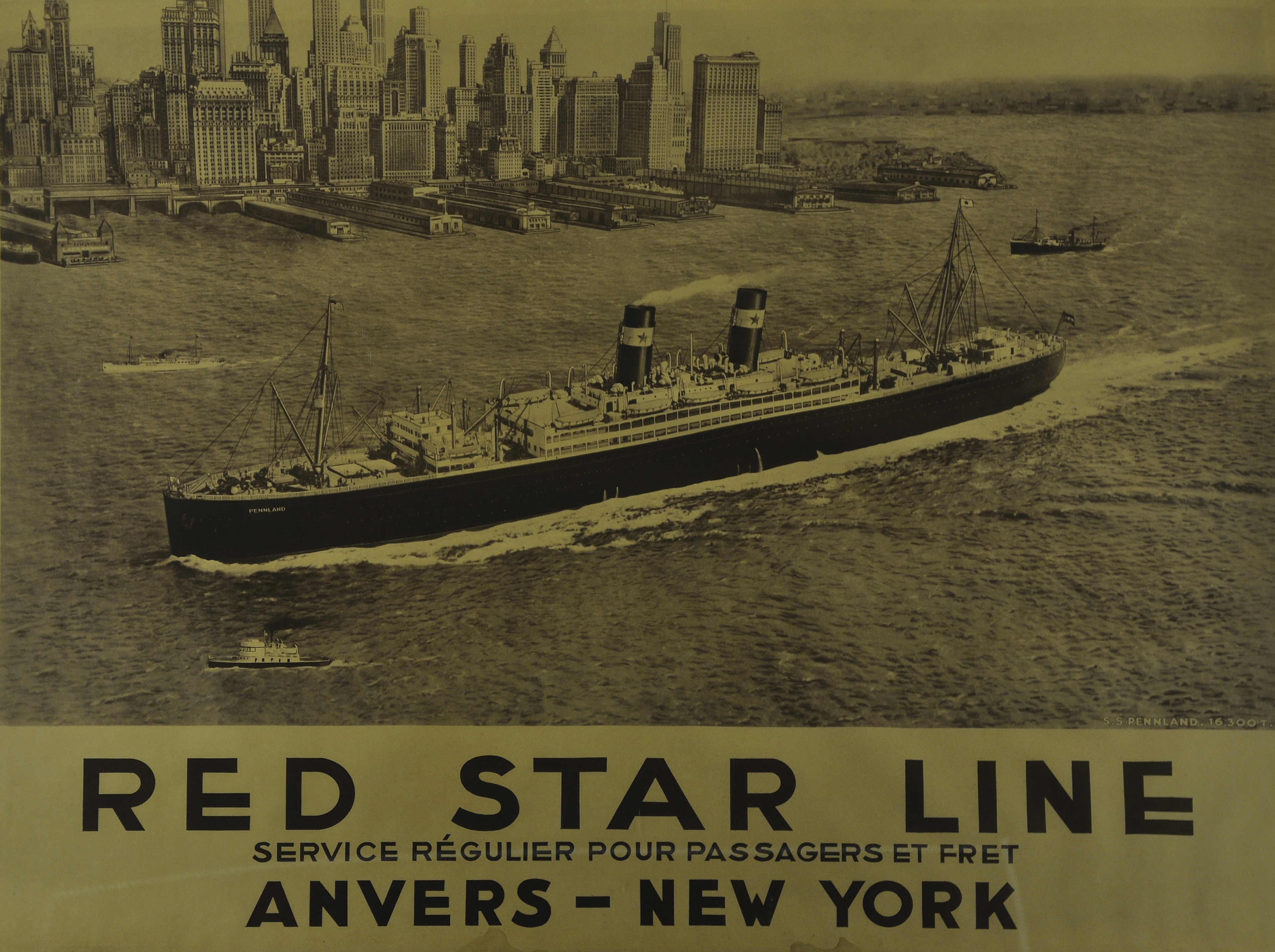 Poster van de Red Star Line met de Pennland (2), gebouwd in 1920 door Harland & Wolff